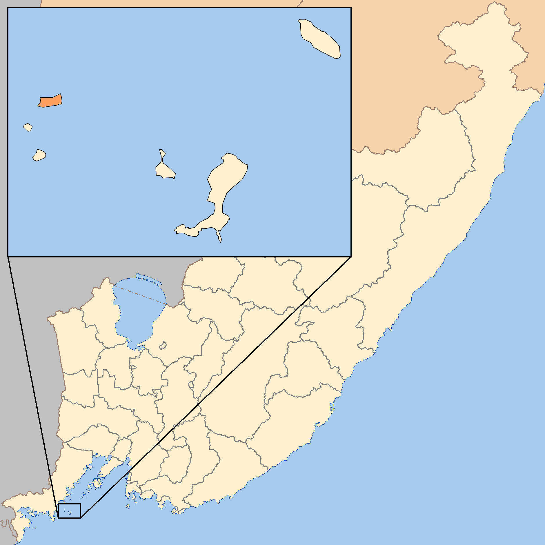 Остров Де-Ливрона на карте Приморского края